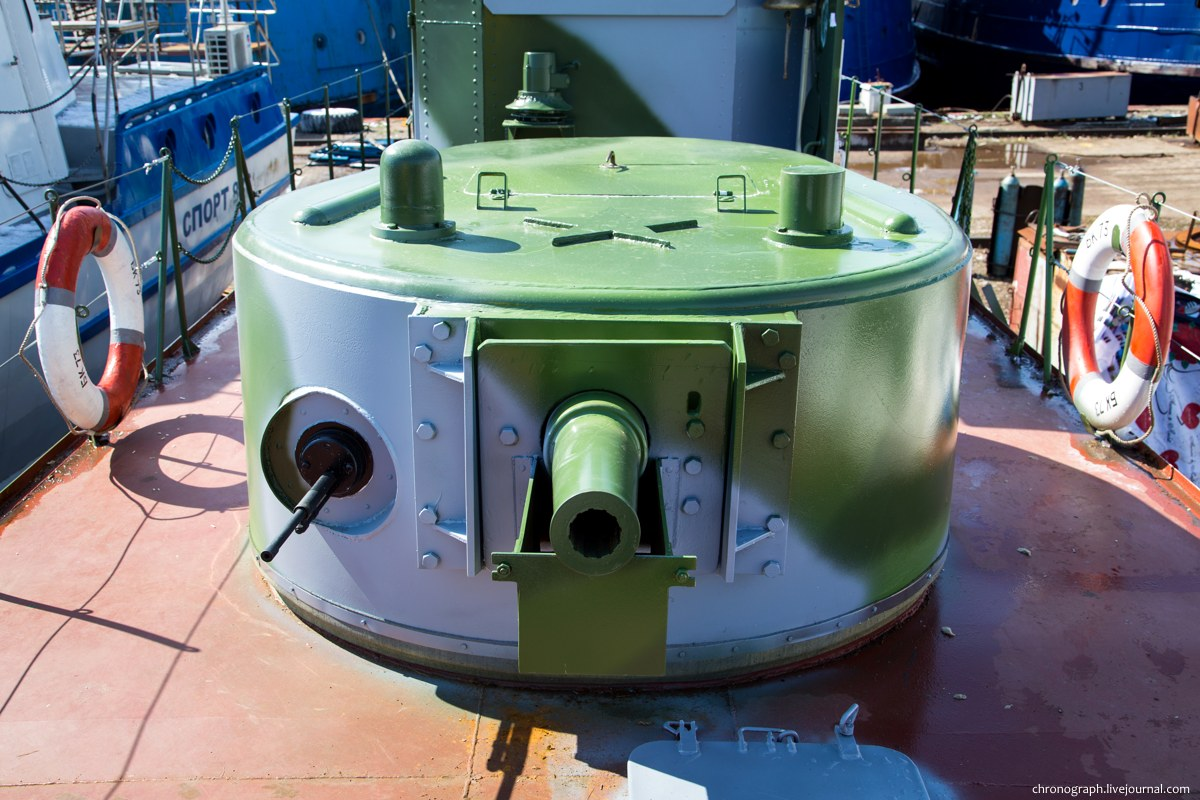 Копия бронекатера БК-73 проекта 1125 времён Великой Отечественной войны. Строительство бронекатера велось на Тольяттинском судоремонтном заводе. Многие использованные детали оригинальные